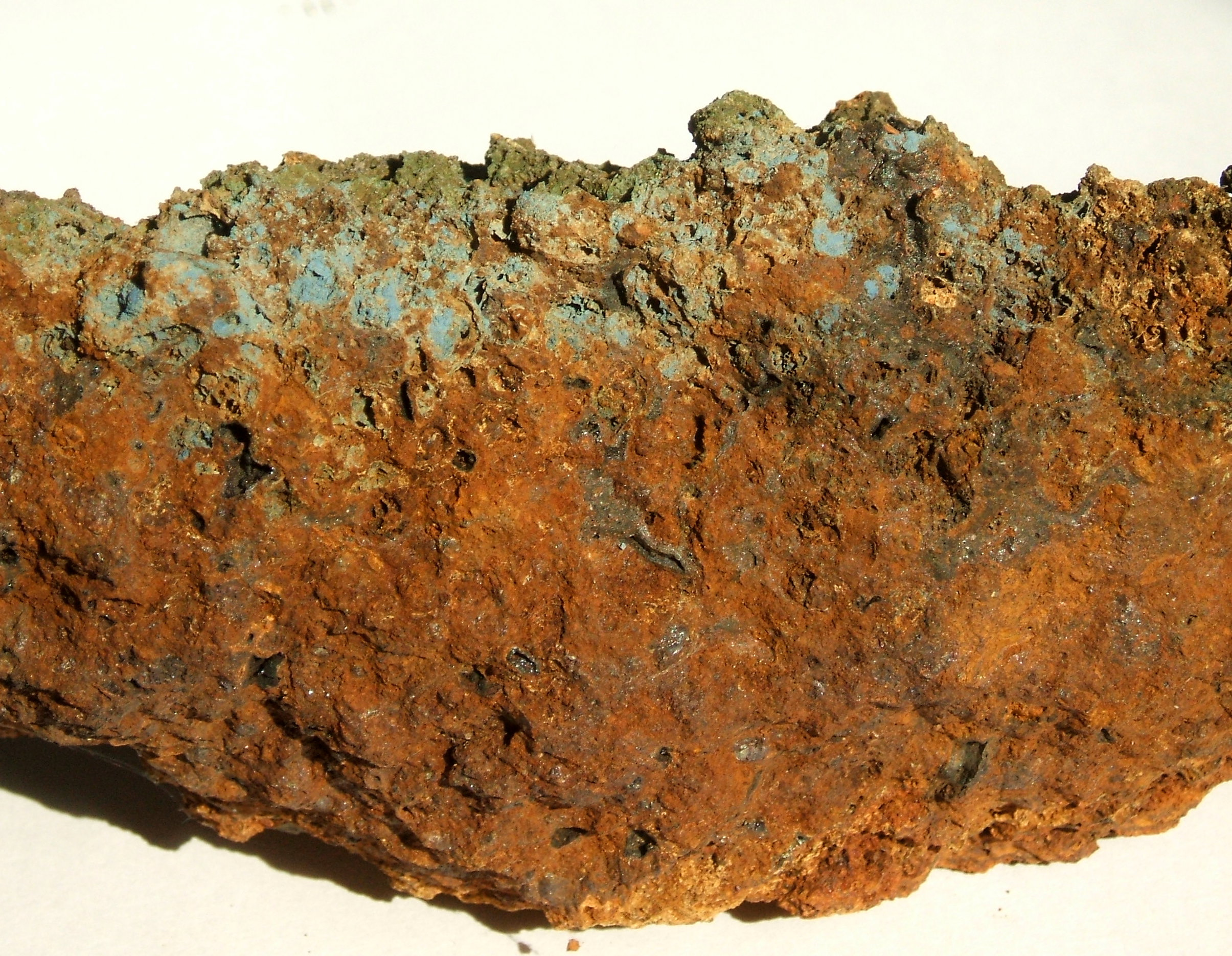 Vivianitausfällung (blau) auf Raseneisenstein